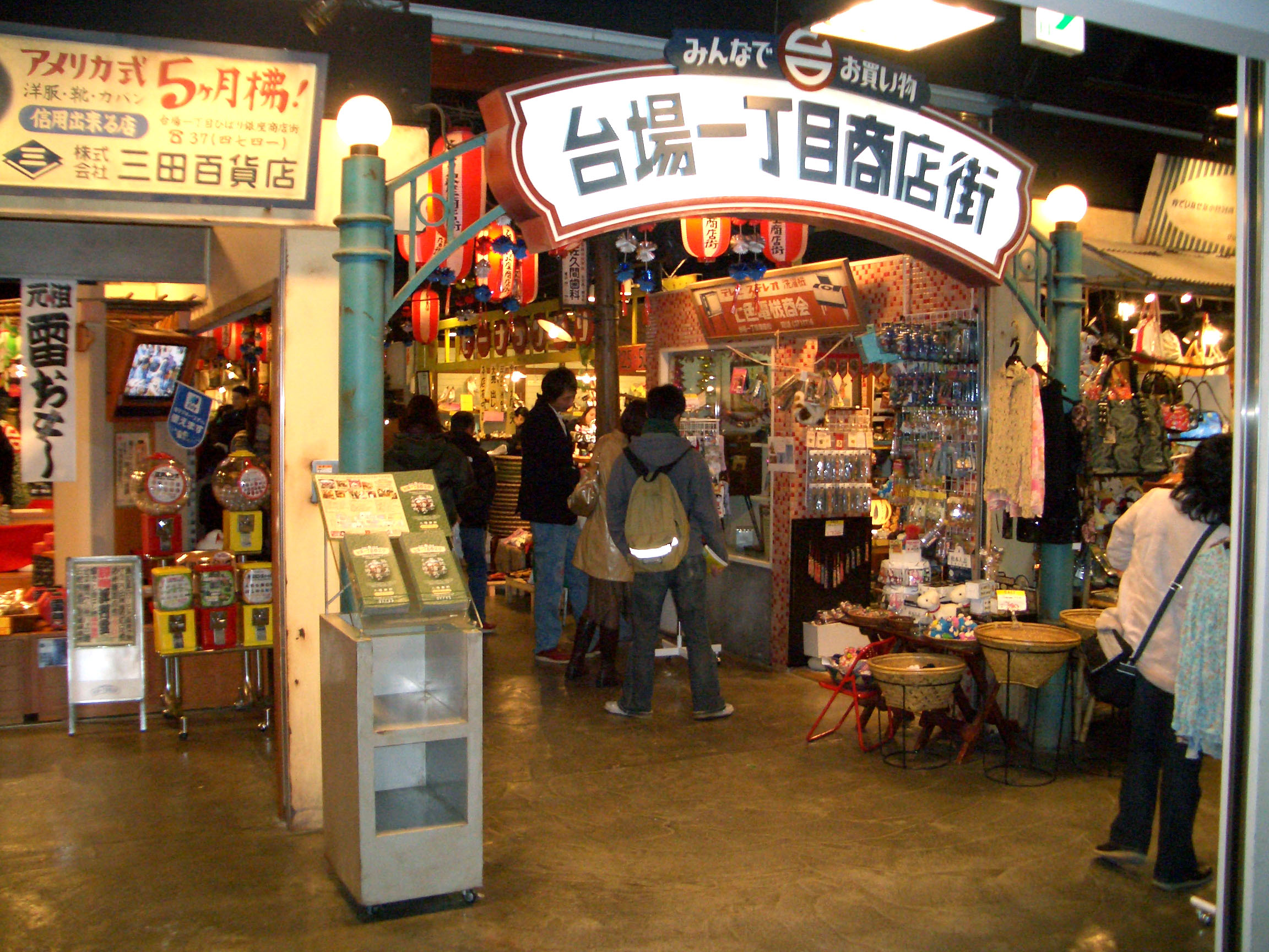 DAIBA 1-CHOME SHOUTENGAI,1-6-1 Daiba Minato-ku Tokyo Japan.